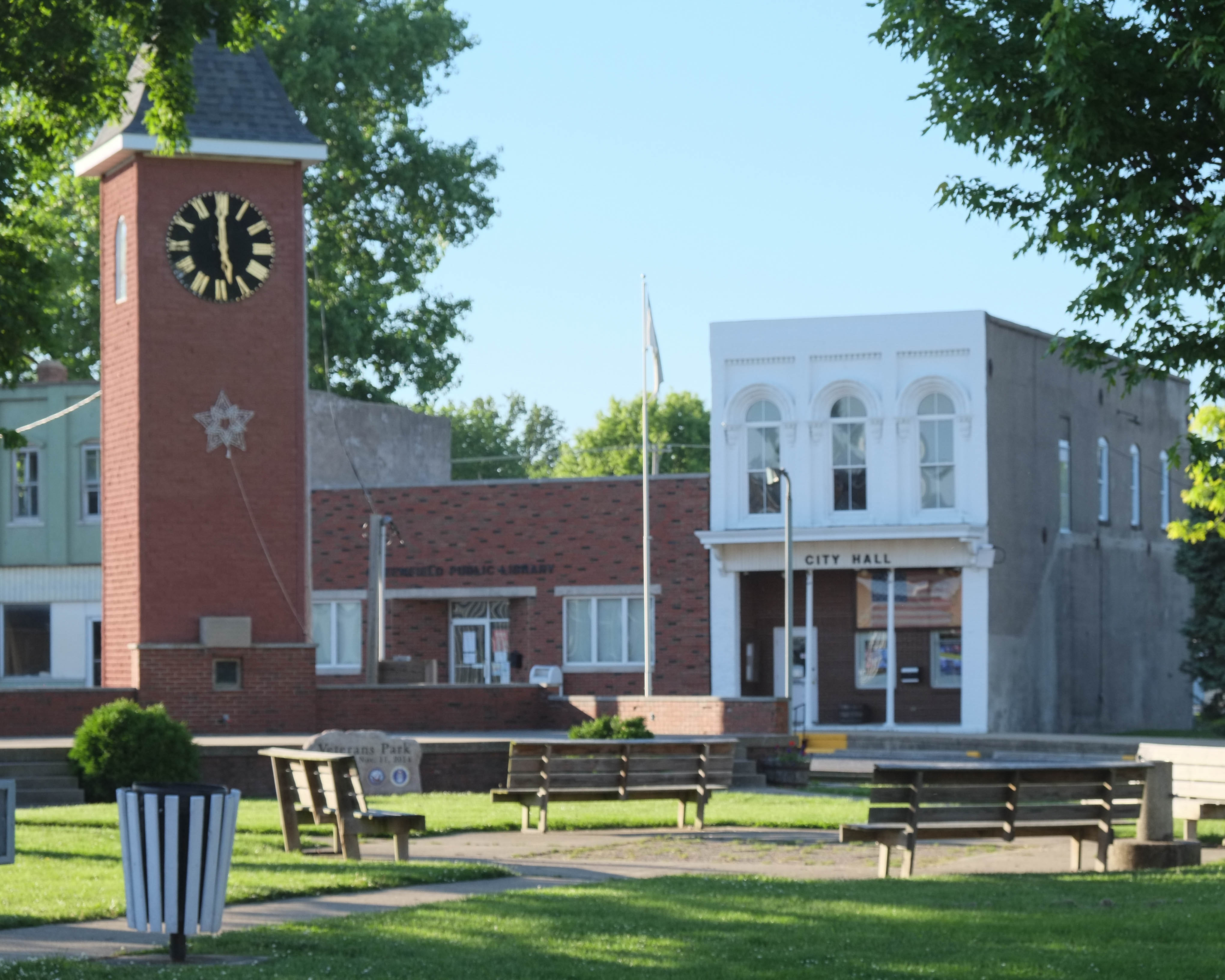 Greenfield, Il